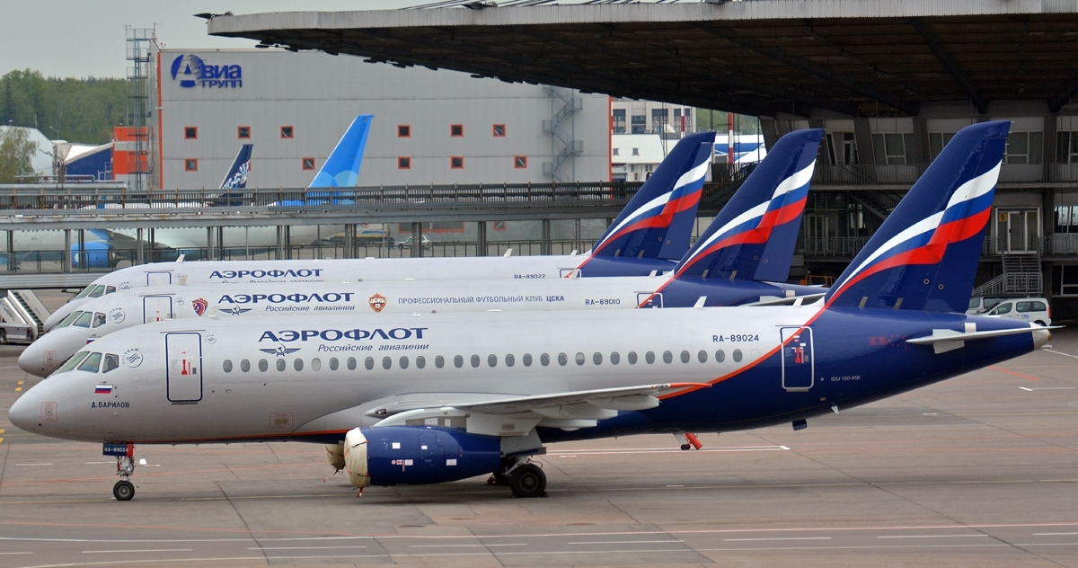 Sukhoi Superjet 100-95 (RA-89024)